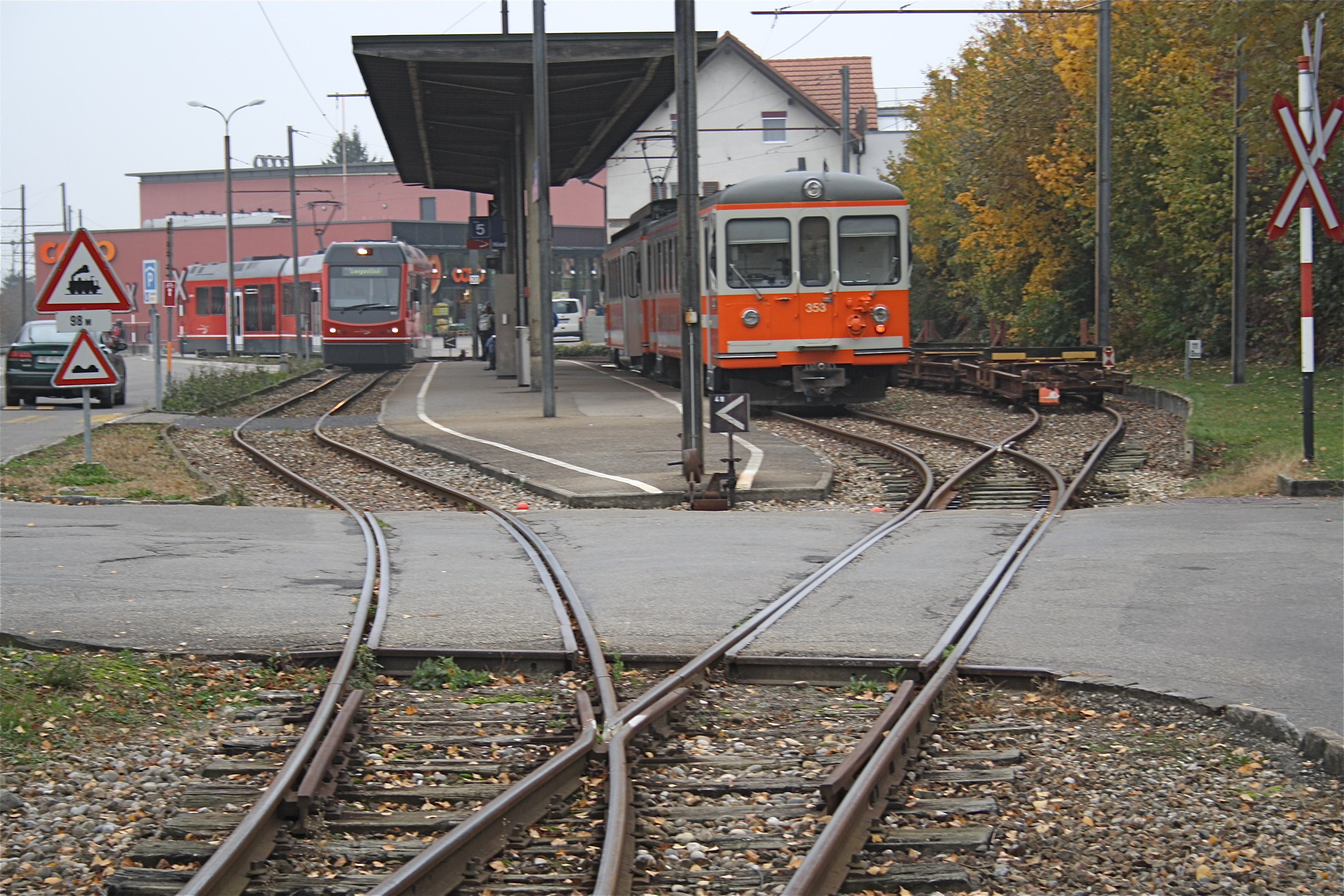 Schmalspurbahnhof Niederbipp